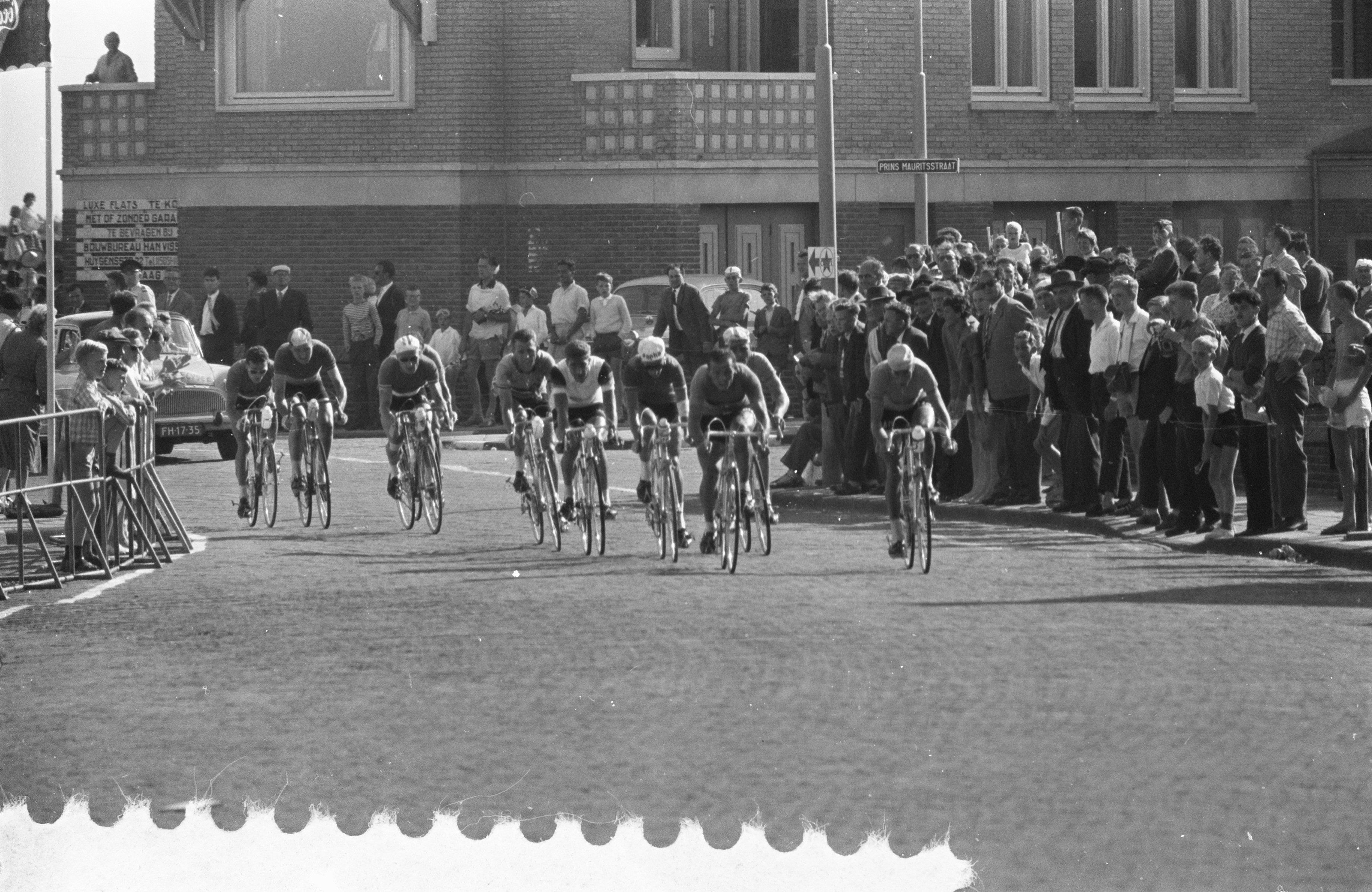 Collectie / Archief : Fotocollectie Anefo Reportage / Serie : [ onbekend ] Beschrijving : Wereldkampioenschappen wielrennen profs op de weg te Zandvoort Datum : 16 augustus 1959 Fotograaf : Rossem, Wim van / Anefo Auteursrechthebbende : Nationaal Archief Materiaalsoort : Negatief (zwart/wit) Nummer archiefinventaris : bekijk toegang 2.24.01.05 Bestanddeelnummer : 910-6025